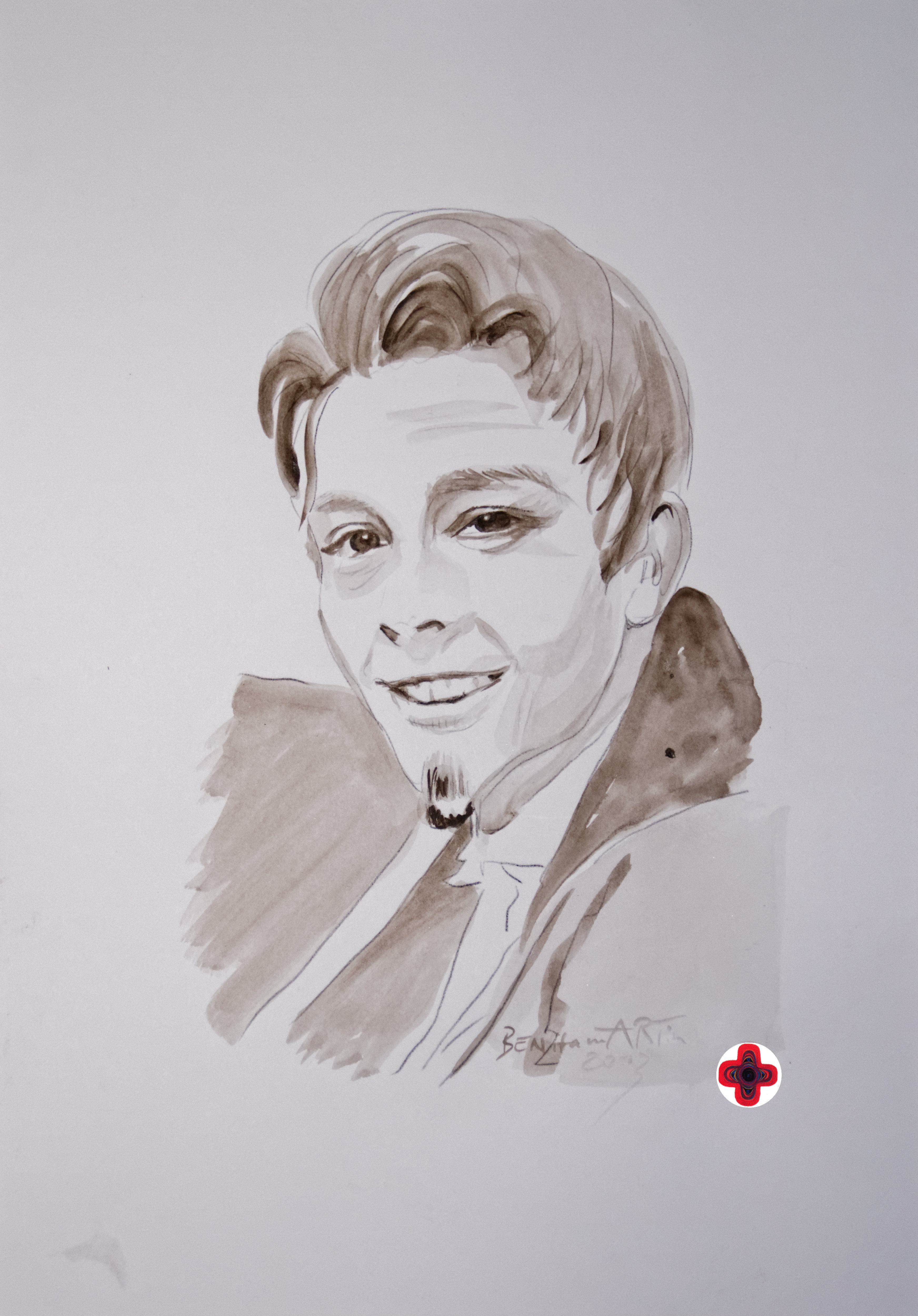 Portrait gemalt von Benita Martin ADA Dimensionsmalerei® mit Acryl, Kohle und Graphit auf Aquarellpapier.